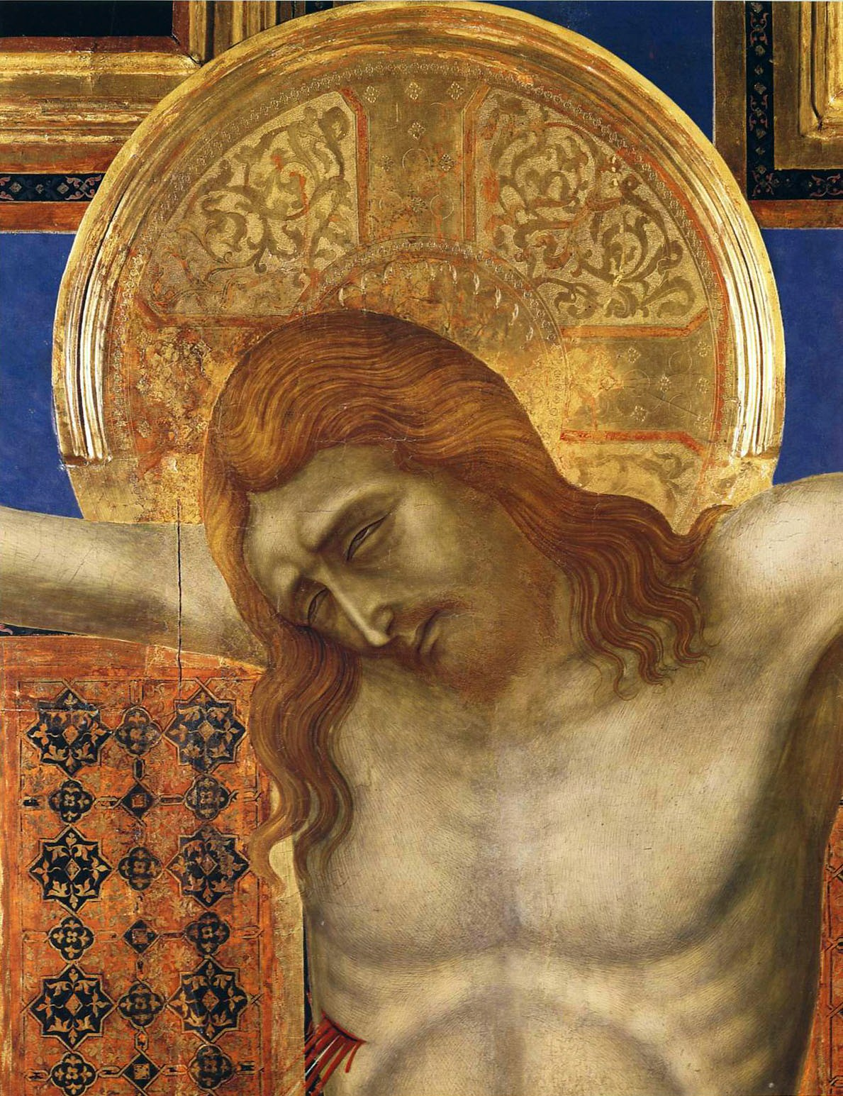 Croce Dipinta detail